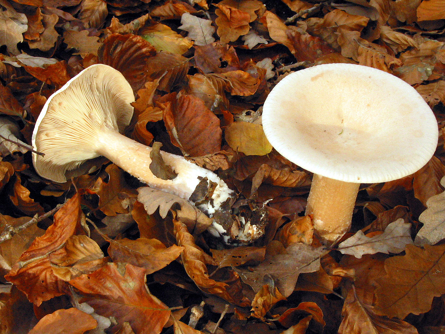 Clitocybe geotropa (Belgique/Belgium), forêt de hêtres et de chênes./ beeches and oaks forest.